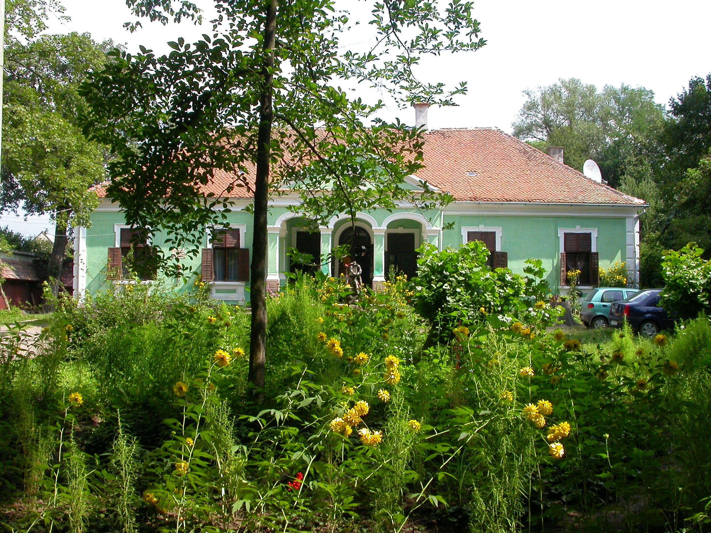 Conacul Mari (Casa scriitorului Benedek Elek), 1906